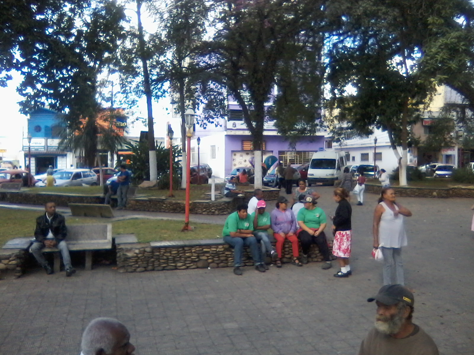 Praça do centro de Itaquaquecetuba, São Paulo.